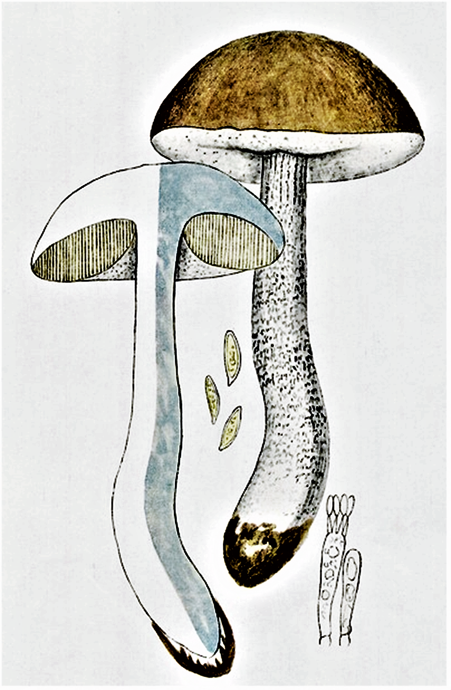 Giacomo Bresadola: Boletus scaber (Bull., 1783), heute Leccinum scabrum (Bull.) Gray (1821)